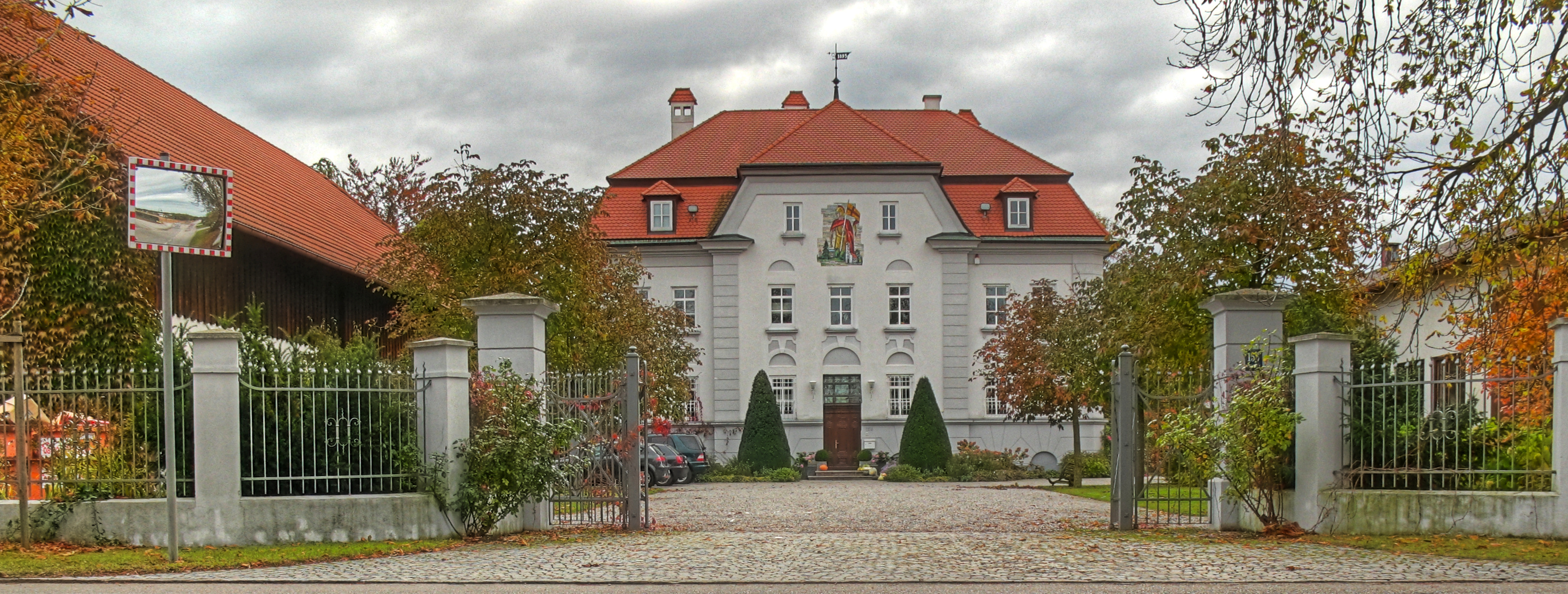 Deutschland, Bayern, Landkreis Fürstenfeldbruck, Olching, Ortsteil Geiselbullach, Gut Geiselbullach, Tonemapped HDR-Aufnahme